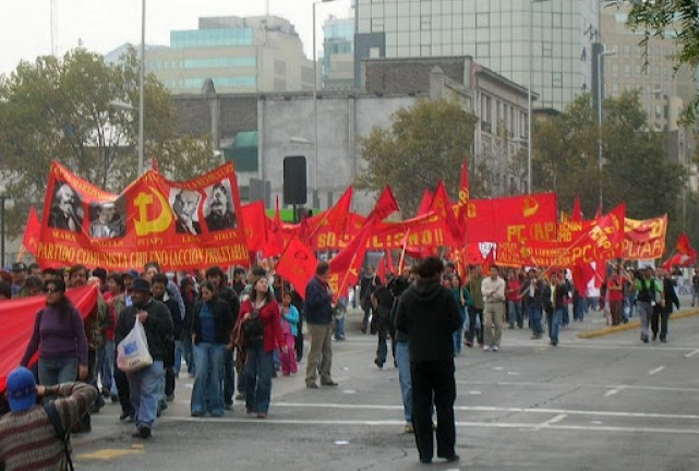 Bloque del Partido Comunista Chileno (Acción Proletaria) en una marcha de 1 de mayo.